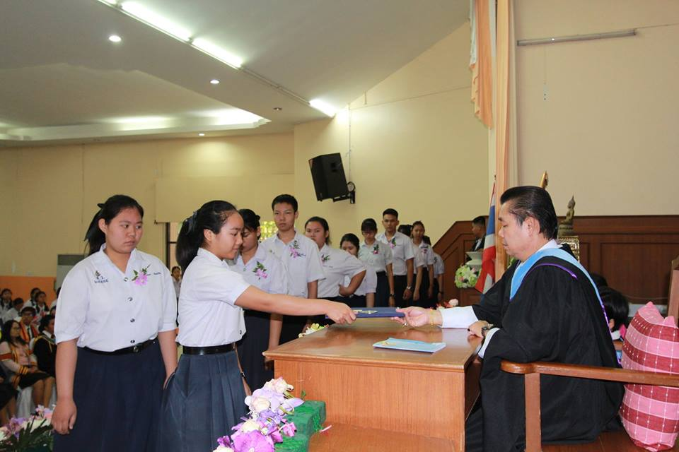 พิธีปัจฉิมนิเทศและจบหลักสูตร ปีการศึกษา 2560